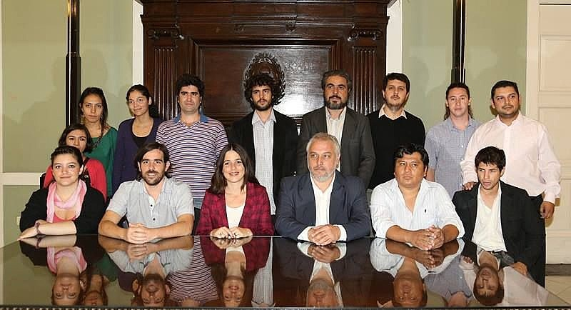 El Frente de Izquierda y de los Trabajadores (FIT), en marzo de 2015.